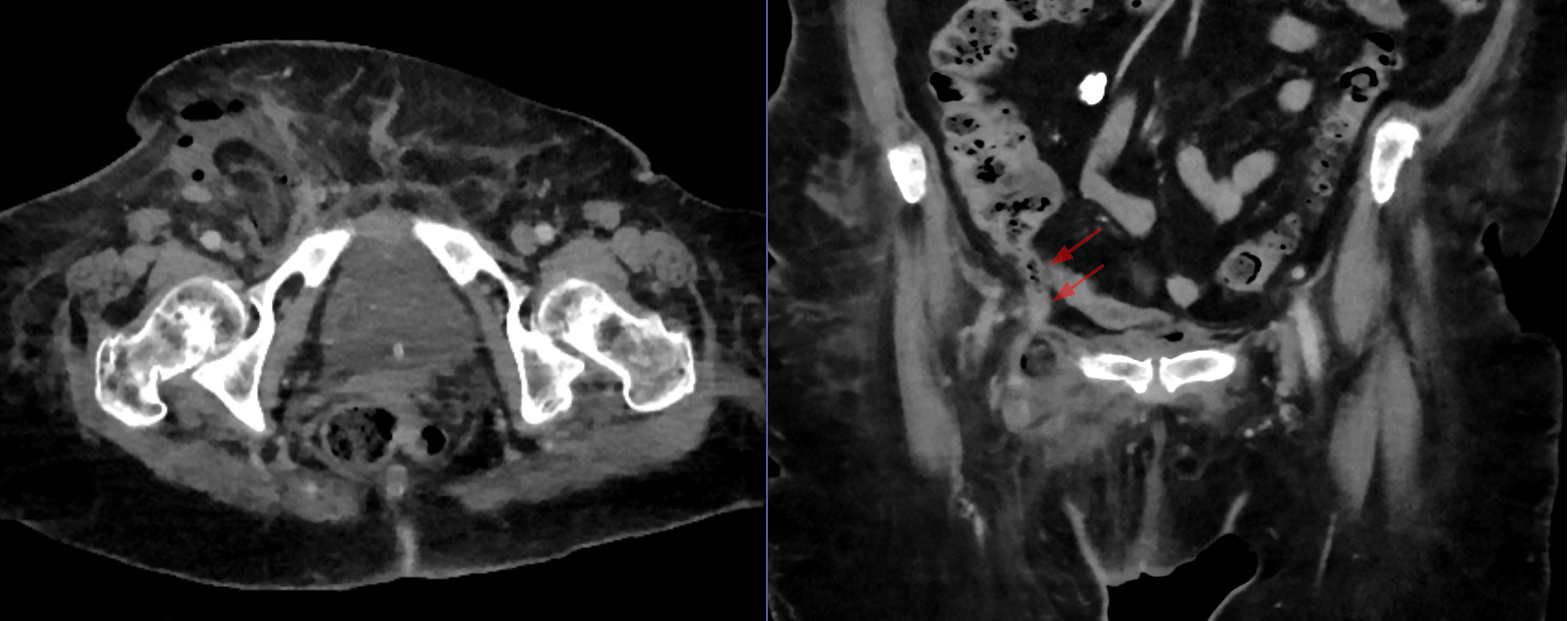 Schenkelhernie mit in diese hineinziehende Appendizitis: De-Garengeot-Hernie. Computertomographie axial und coronar. Das entsprechende Pendant in einer Leistenhernie heißt Amyand-Hernie.